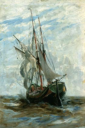 Турецкая кочерма. Браилов.